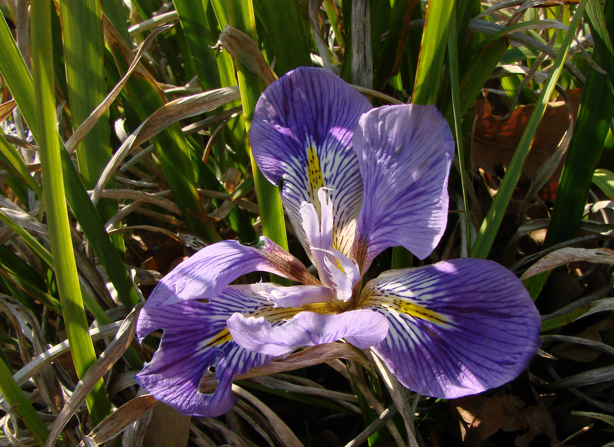 Iris unguicularis, photographie prise le 17-02-2008 au Jardin des Plantes à Paris. Cette variété naturelle pousse en Grèce, en Crête, en Asie Mineure et en Afrique du Nord.